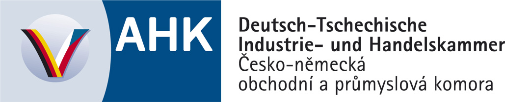 Logo ČNOPK